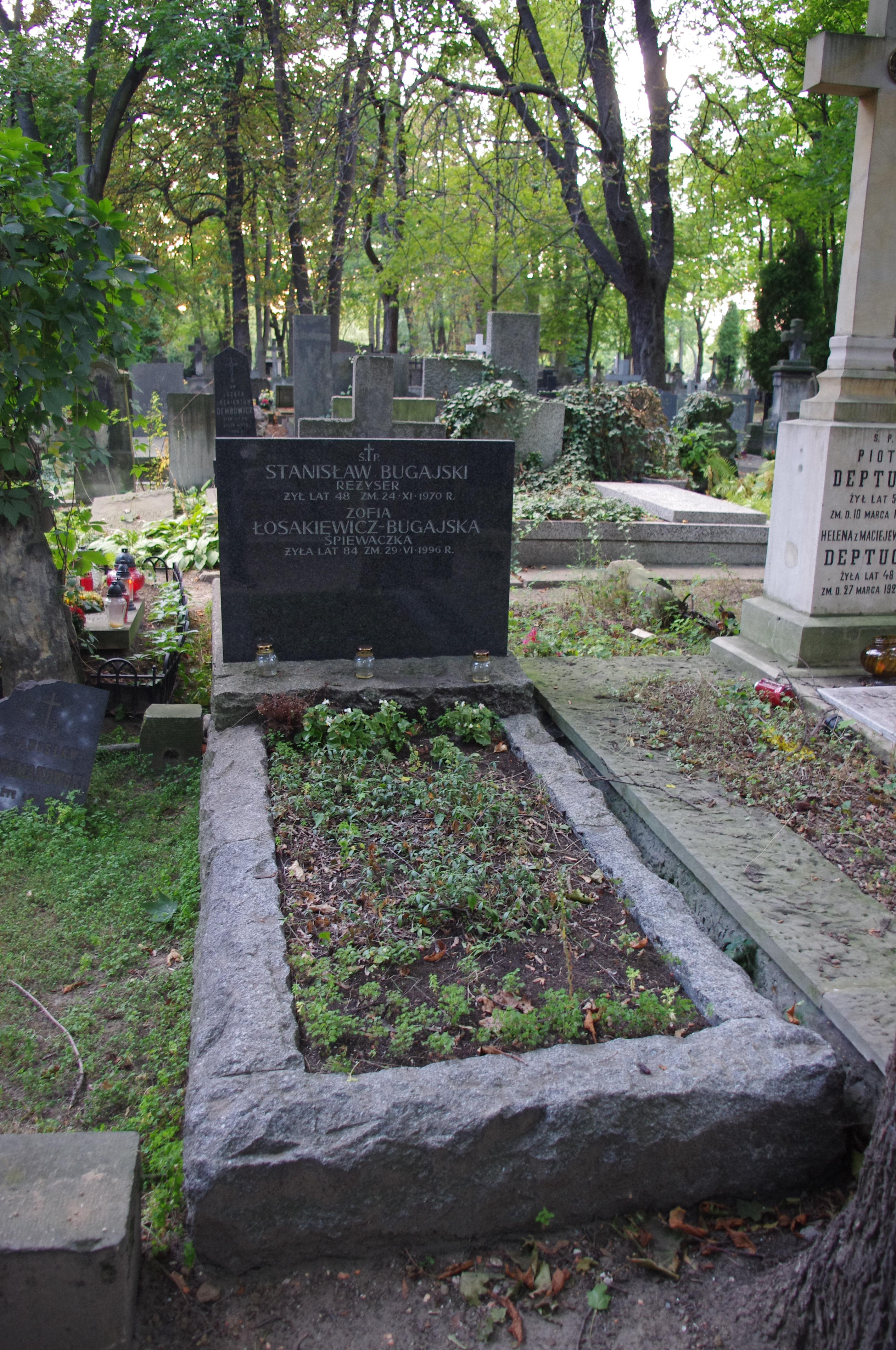 Grób reżysera Stanisława Bugajskiego I śpiewaczki Zofii Łosakewicz-Bugajskiej na Cmentarzu Powązkowskim w Warszawie